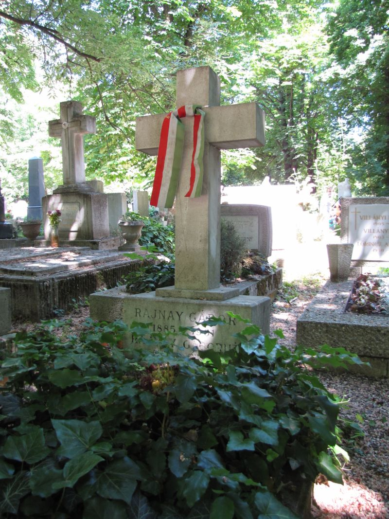 Rajnai Gábor (Arad, 1885. máj. 11. – Bp., 1961. júl. 10.): színész, a Nemzeti Színház örökös tagja sírja Budapesten. Farkasréti temető: 1-1-272.